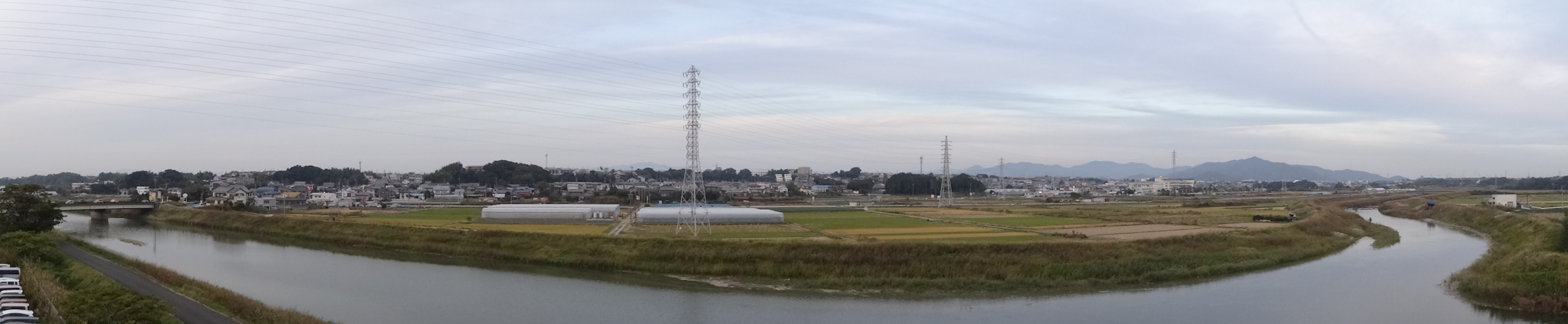 高師台を南側、イオン豊橋南店立体駐車場から撮影した。梅田川から少し距離を離して台地状に土地が盛り上がっていることが確認できる。